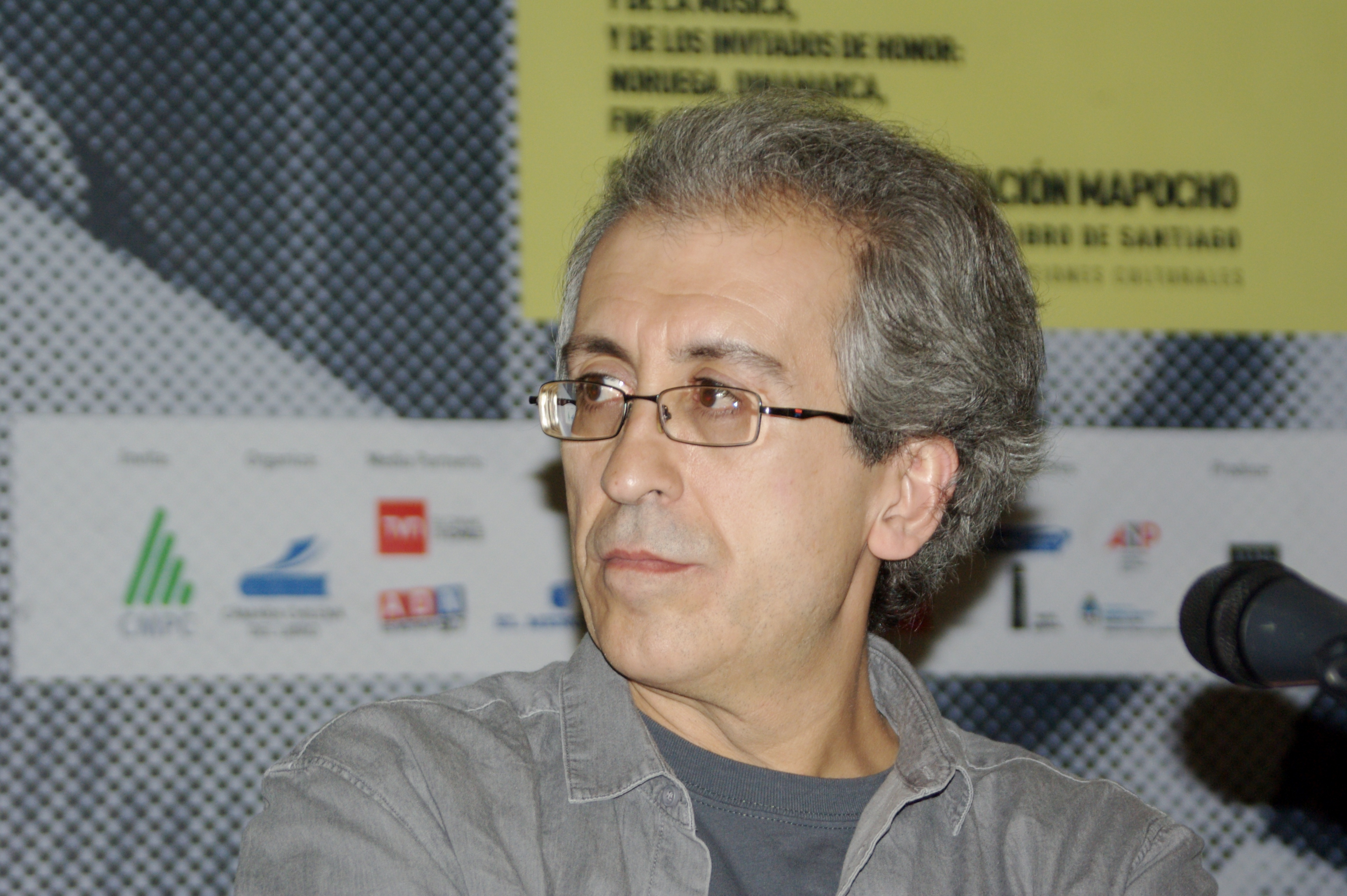 El escritor y crítico literario español David Roas en la Feria Internacional del Libro de Santiago 2015